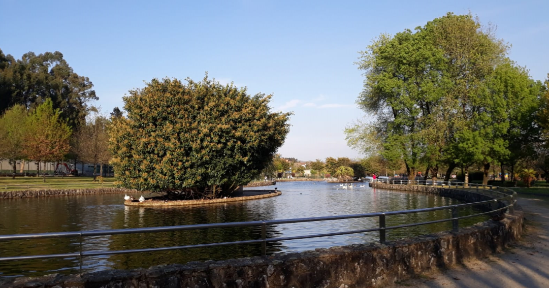 Estanque con patos e barcas